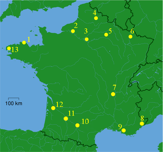 Carte des lieux visités dans l'album Le Tour de Gaule d'Astérix créée à partir de File:Reims dot.png de User:Lupin Les lieux sont parfois situés (très) approximativement.